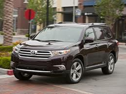 Highlander 2012 despues del rediseño